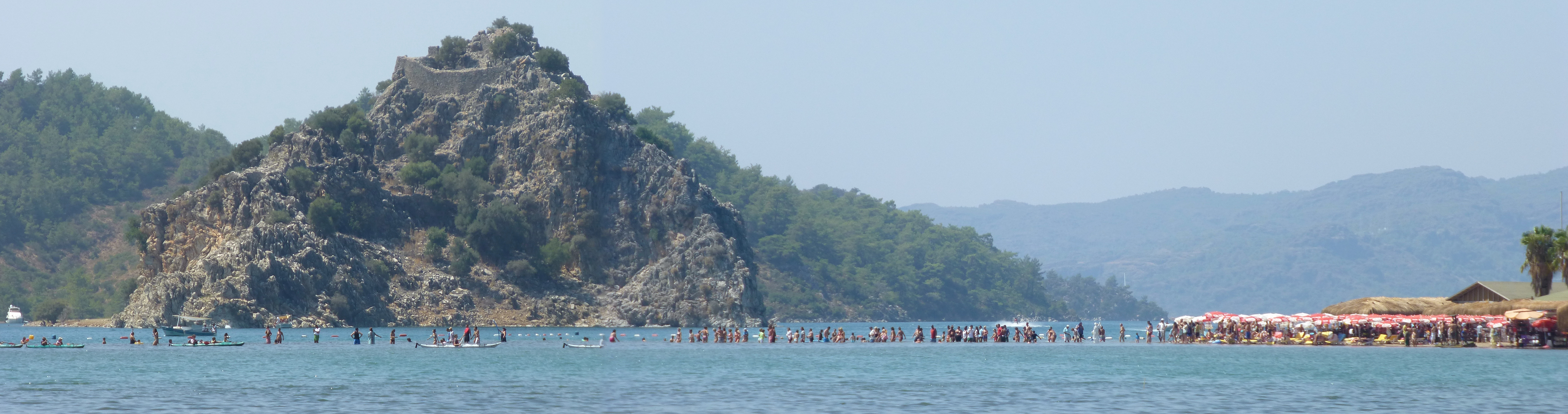 Kızkumu